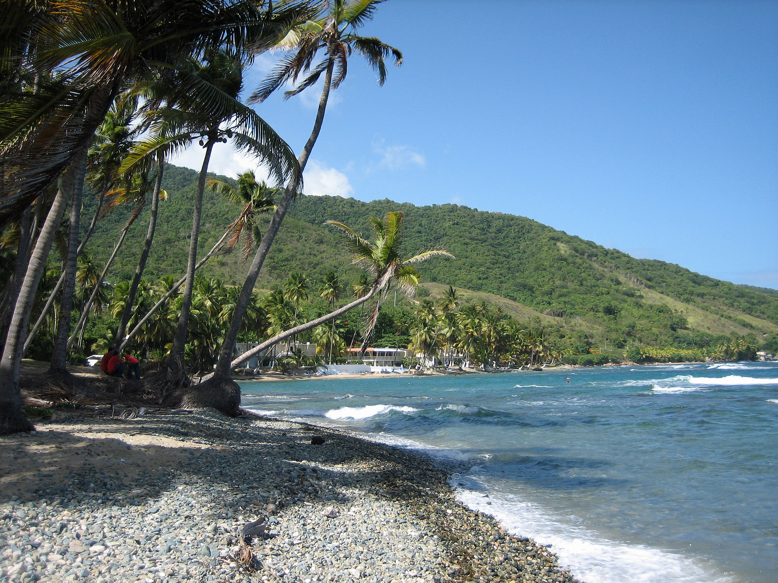 Coast scene in Patillas, Puerto Rico